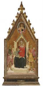 Maestro di San Gaggio - Madonna con Bambino - Ai lati San Giovanni e l'Arcangelo Michele - Padre Eterno sovrastante Collezione privata